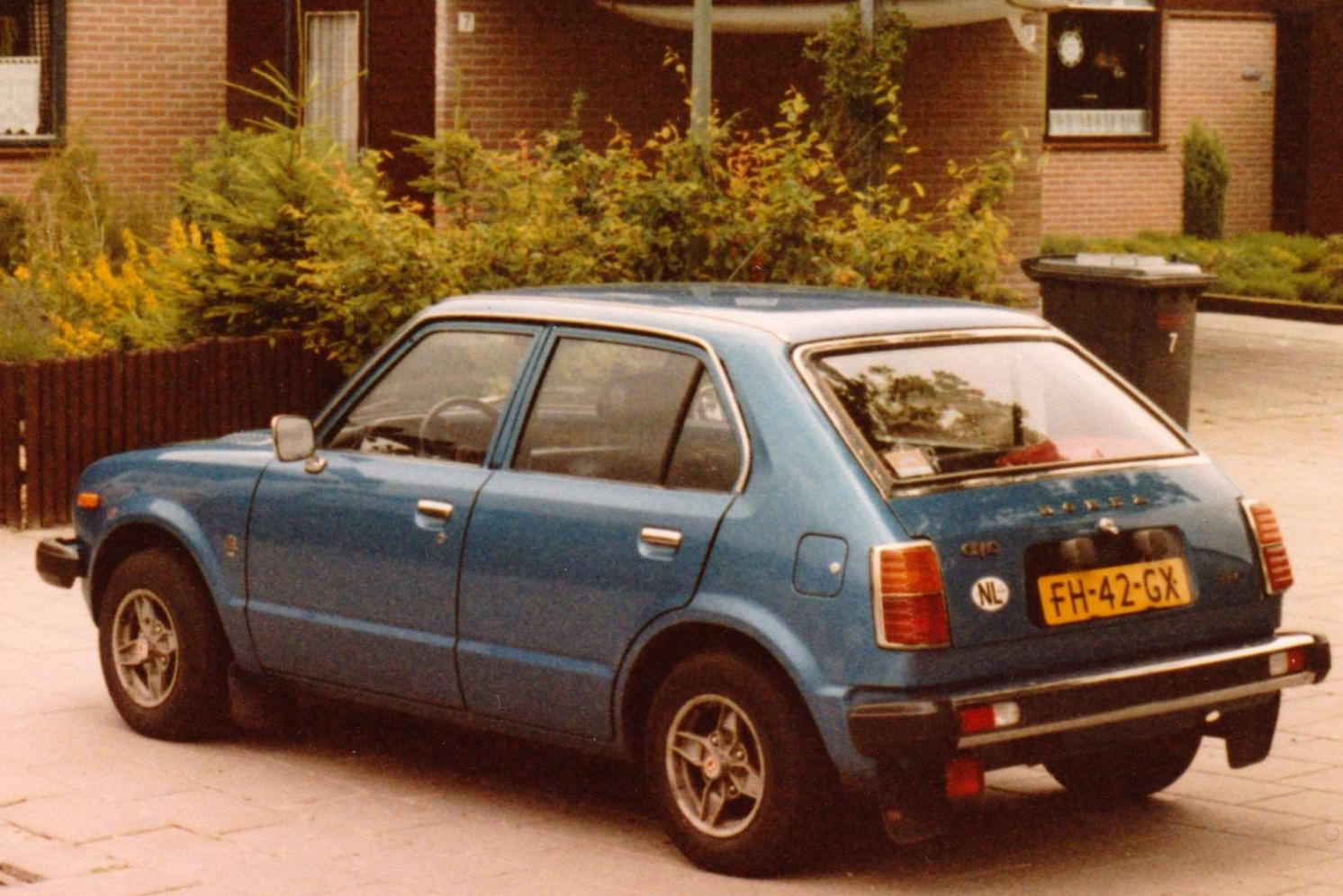 Honda Civic, 1e generarie, gekocht oktober 1979